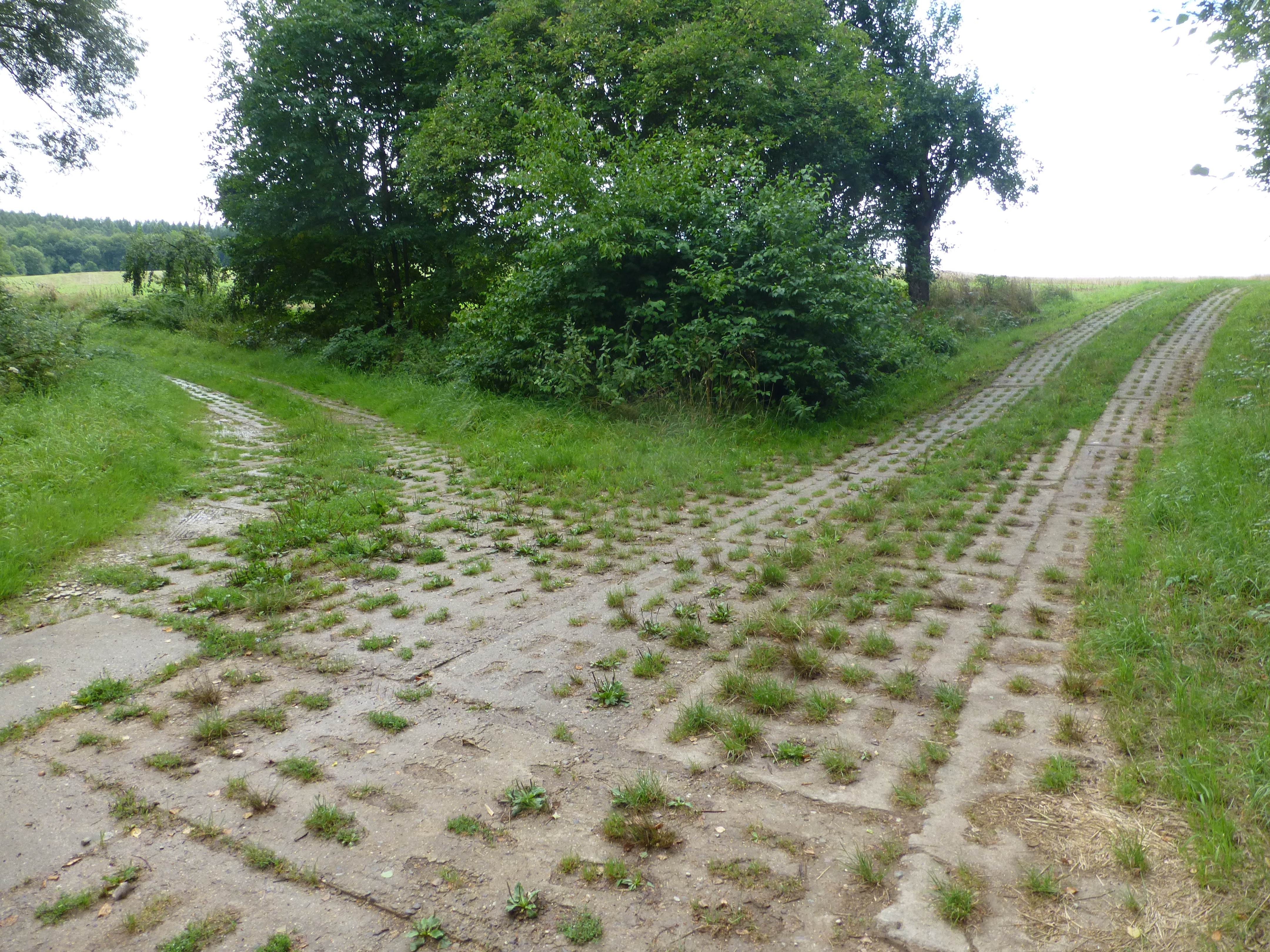 Kolonnenweg im Pferdestallsgraben bei Gerblingerode/Teistungen (im Hintergrund die Gerblingeröder Breiten)